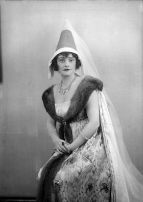 Angerer Margit (Margit von Rupp, Margit Schenker-Angerer) magyar szoprán operaénekesnő.